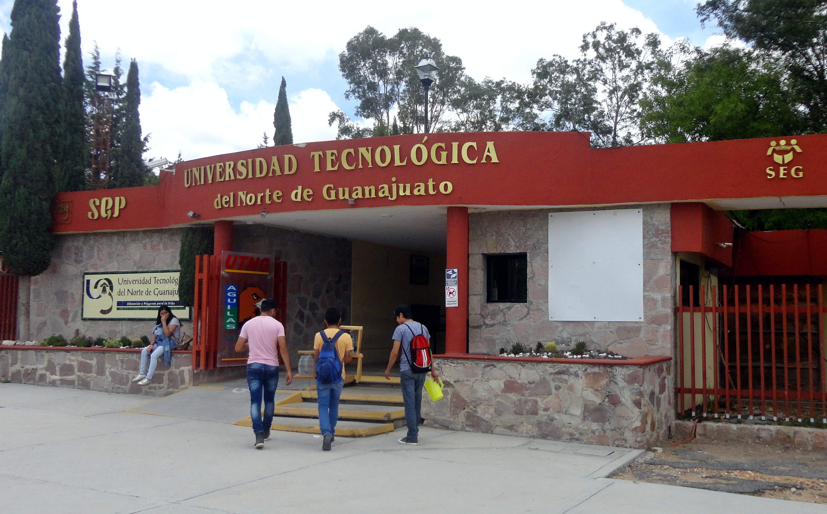 Entrada de la Universidad Tecnológica del Norte de Guanajuato (UTNG), Dolores Hidalgo, Guanajuato, México.